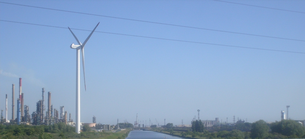 Port ouest de Dunkerque le long de la déviation du canal de Bourbourg